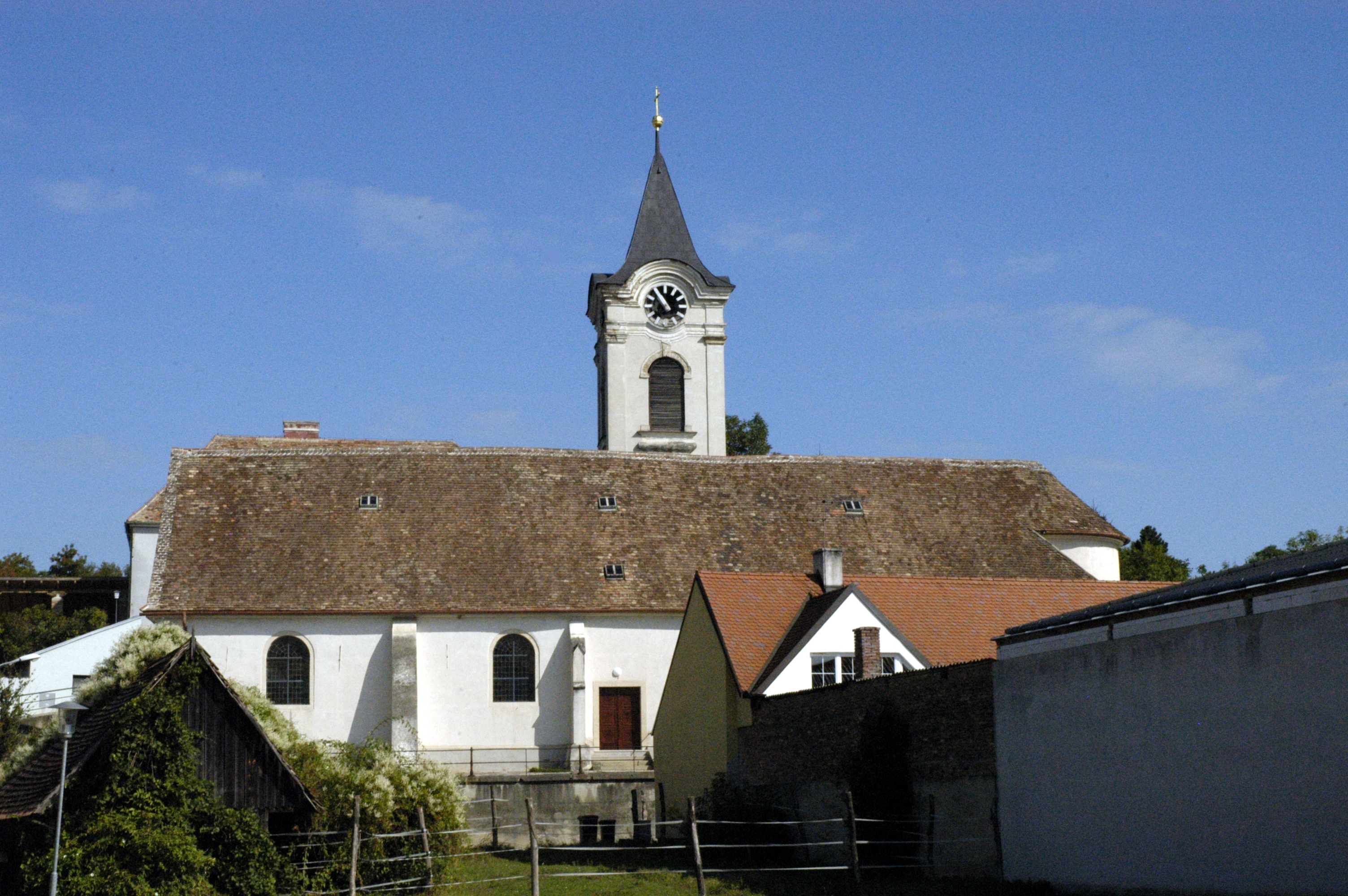 Katholische Pfarrkirche heiliger Johannes der Täufer in Mittergrabern, Gemeinde Grabern